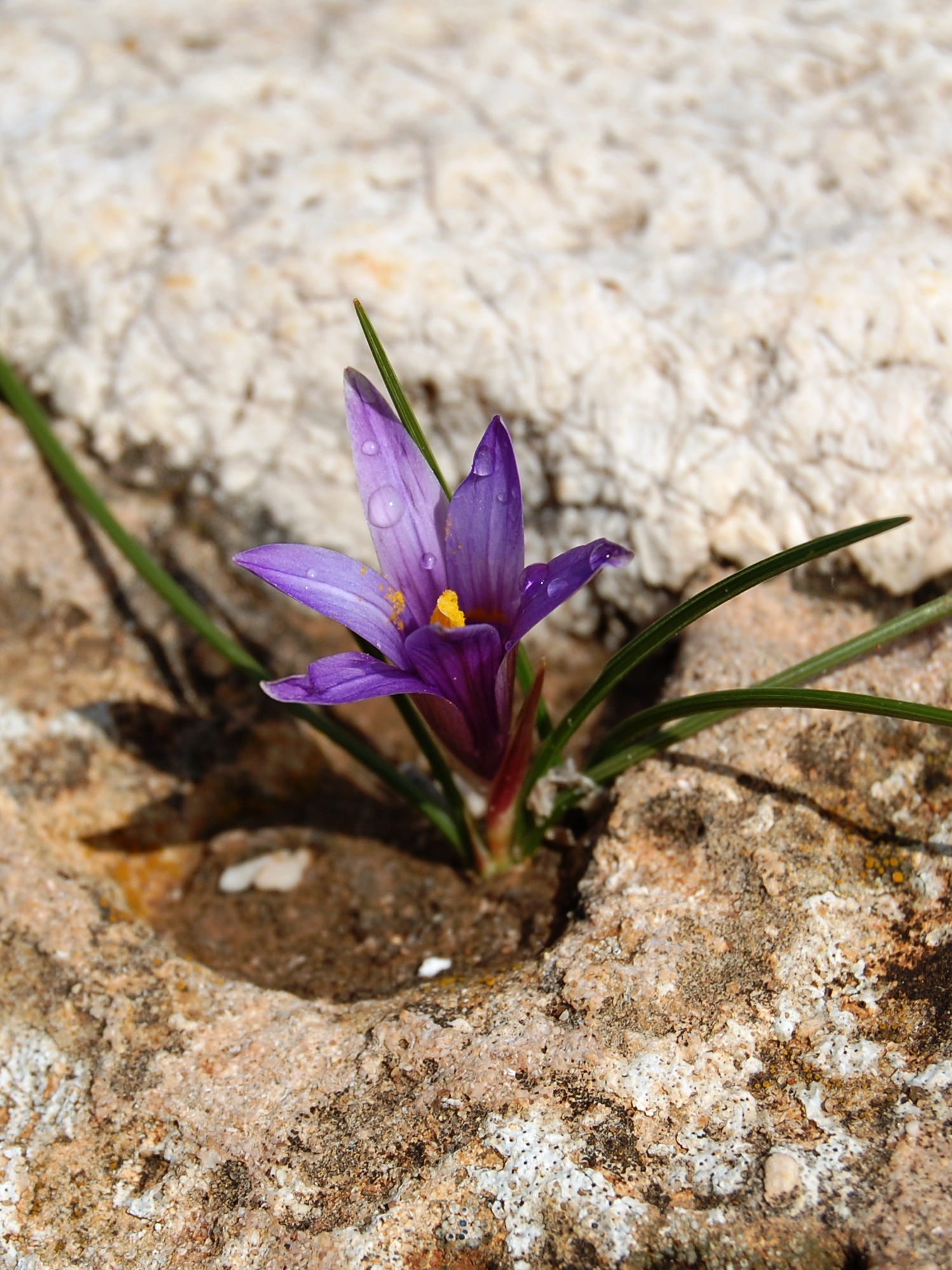 Romulea linaresii Parl. Riserva naturale Monte Cofano, Sicily